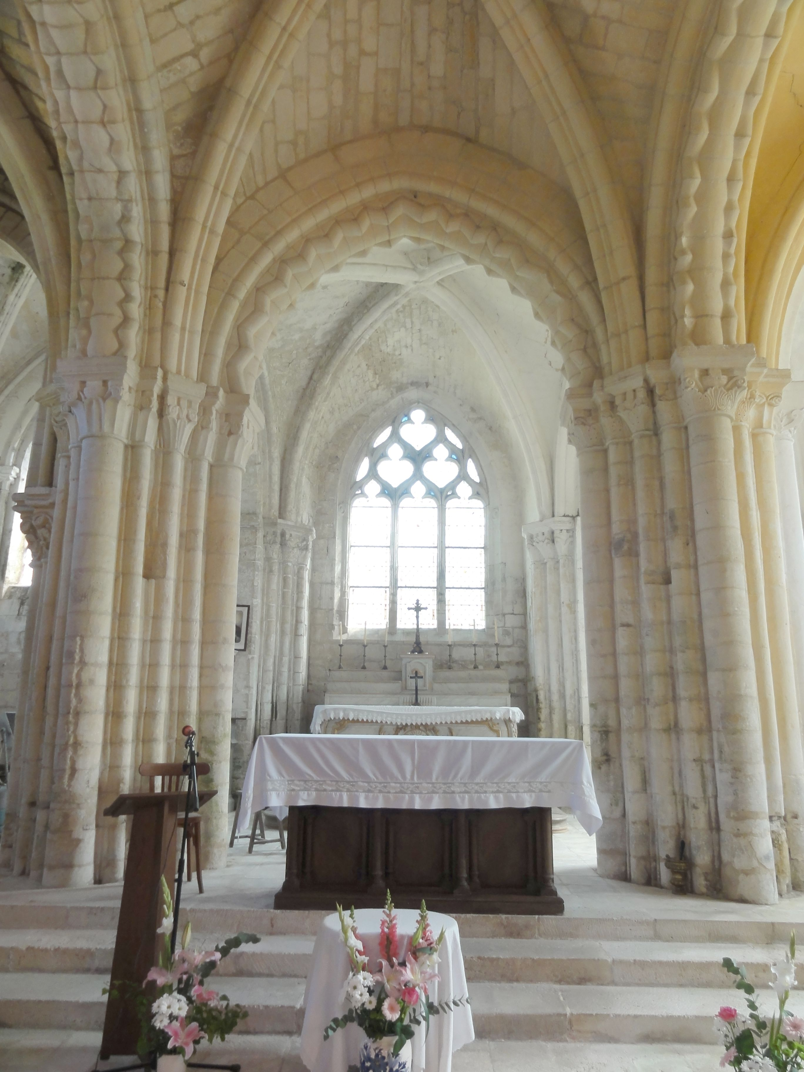 Croisée, vue vers l'est.